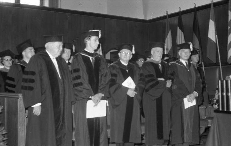 Ehrendoktorwürde der Maryland-Universität in Heidelberg an Bundeskanzler Prof. Erhard